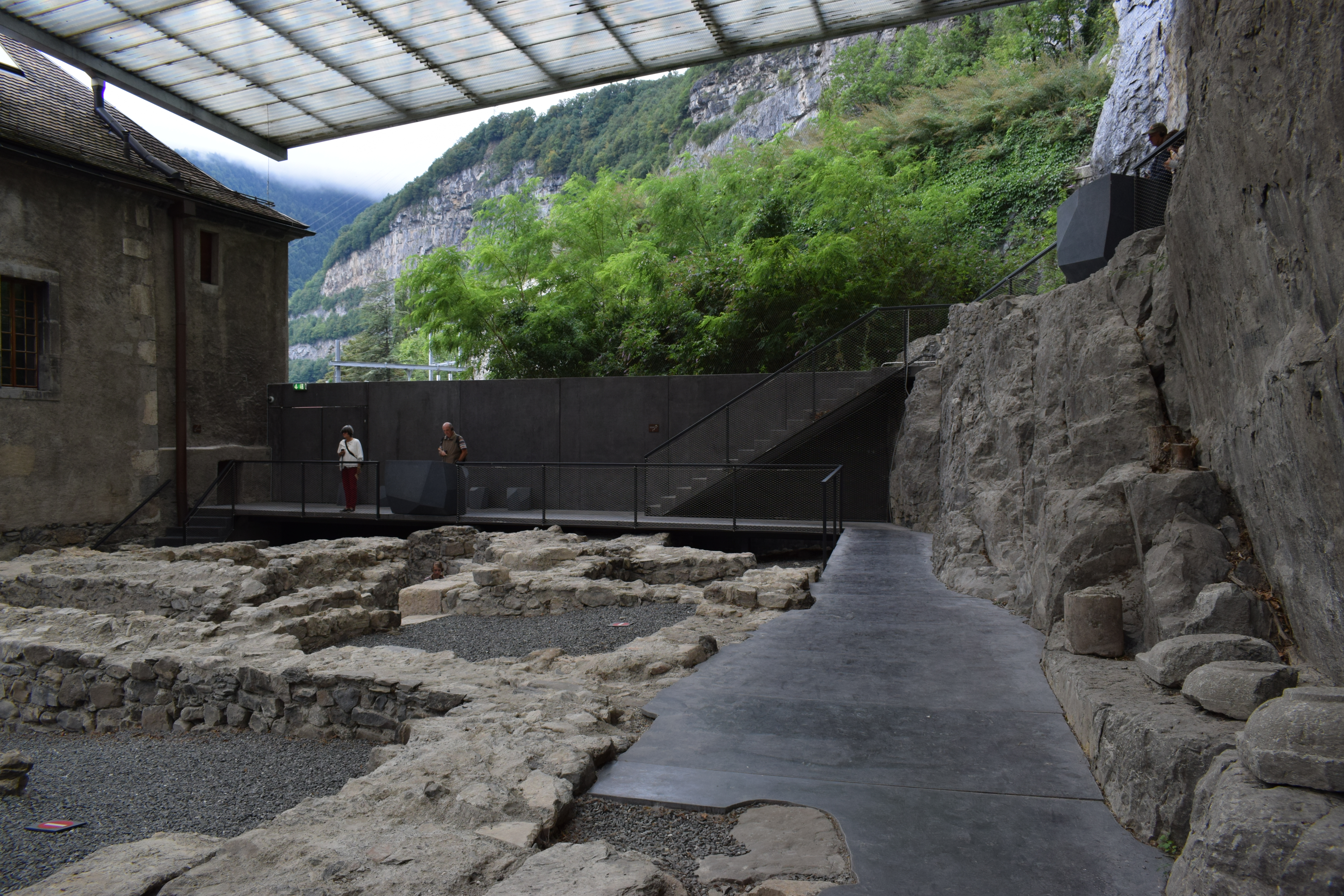 Vue de l'abbaye de Saint-Maurice, dans le canton du Valais (Suisse).